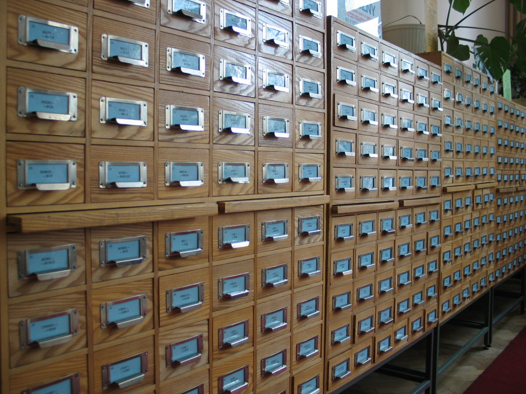 Katalog biblioteczny w Łodzi